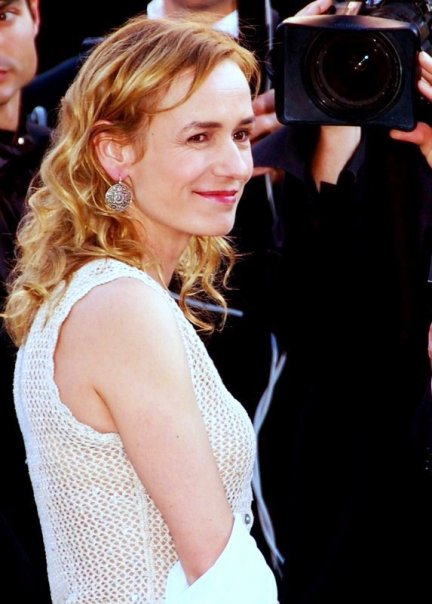 Sandrine Bonnaire au festival de Cannes.